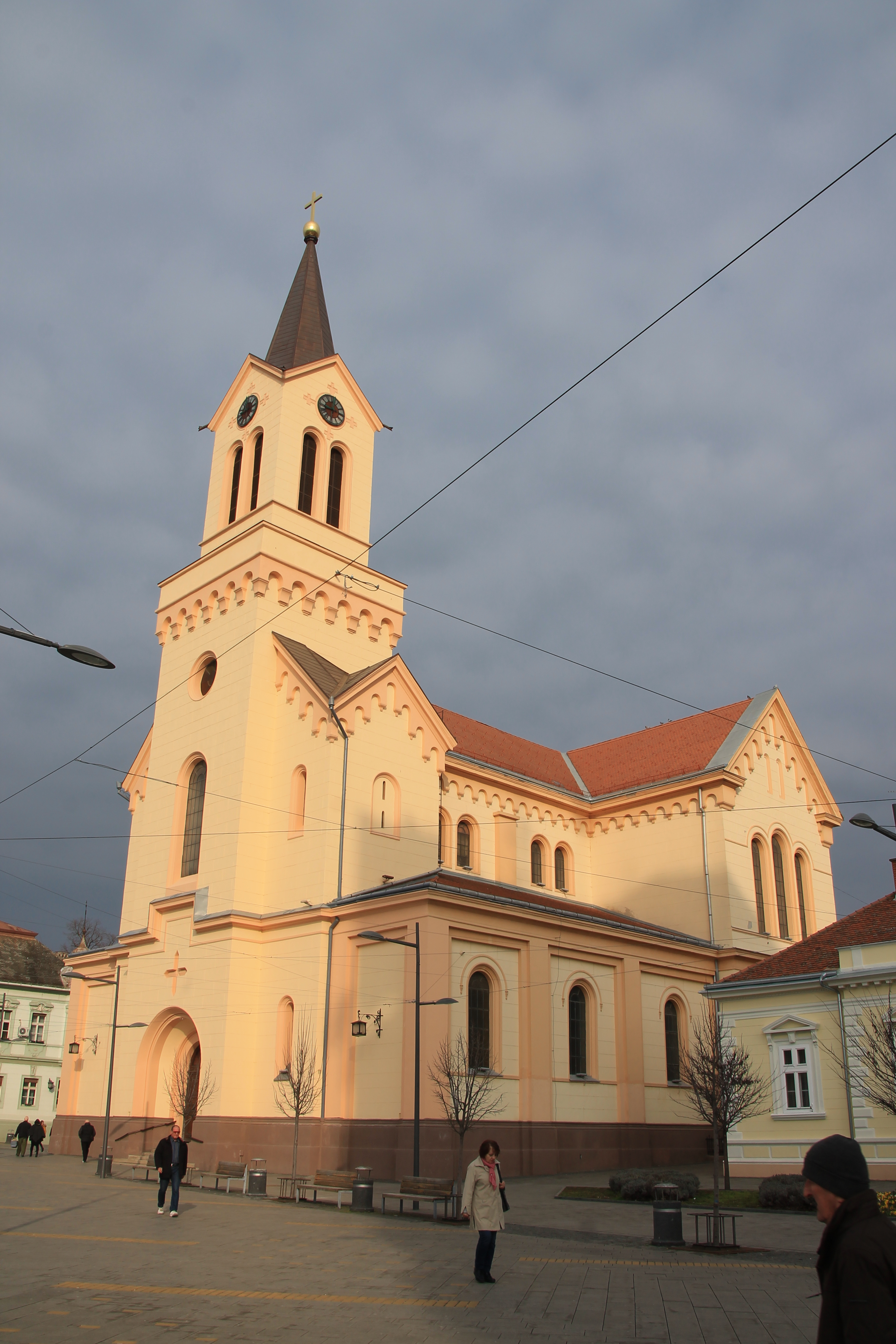 Zrenjanin Cathedral